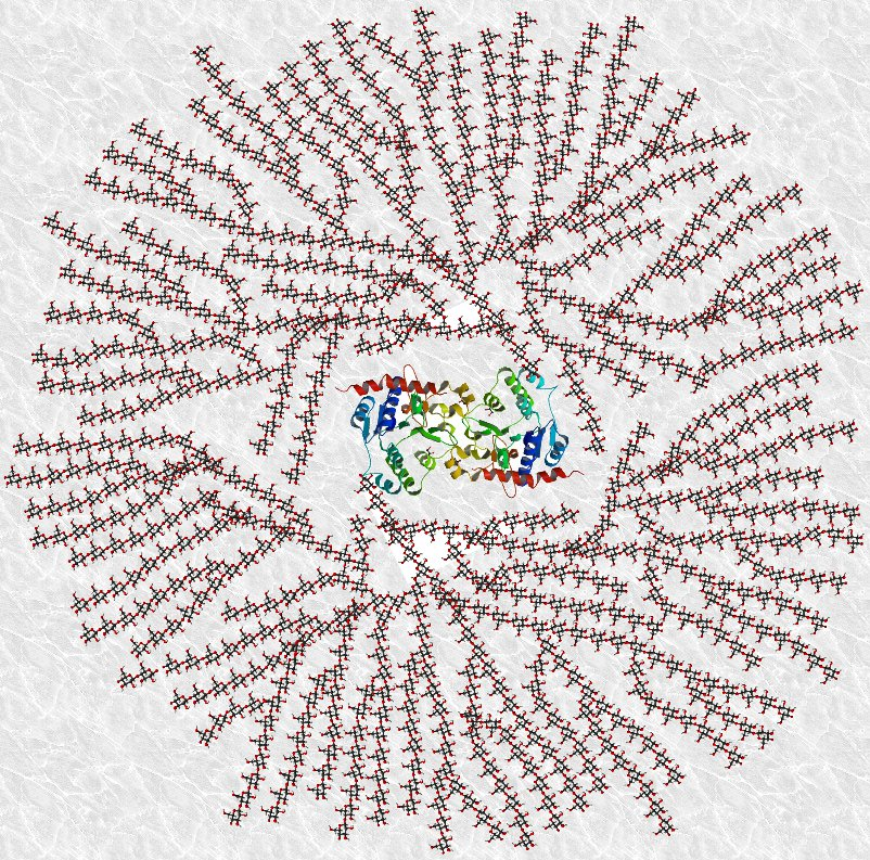 Modelo de la molécula de glucógeno incluyendo el núcleo formado por la proteína glicogenina